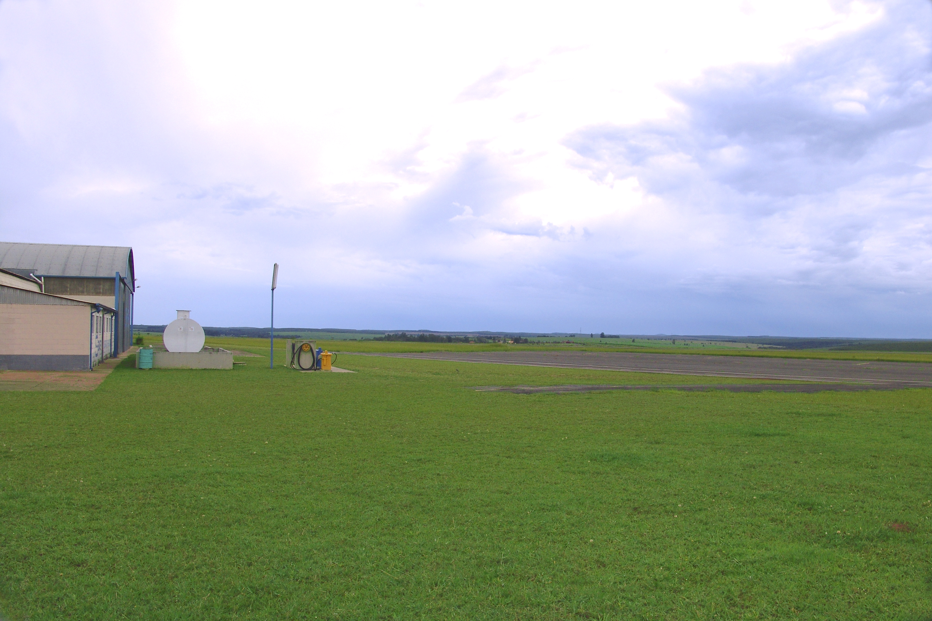 Aeroporto no município de Botucatu, São Paulo, Brasil